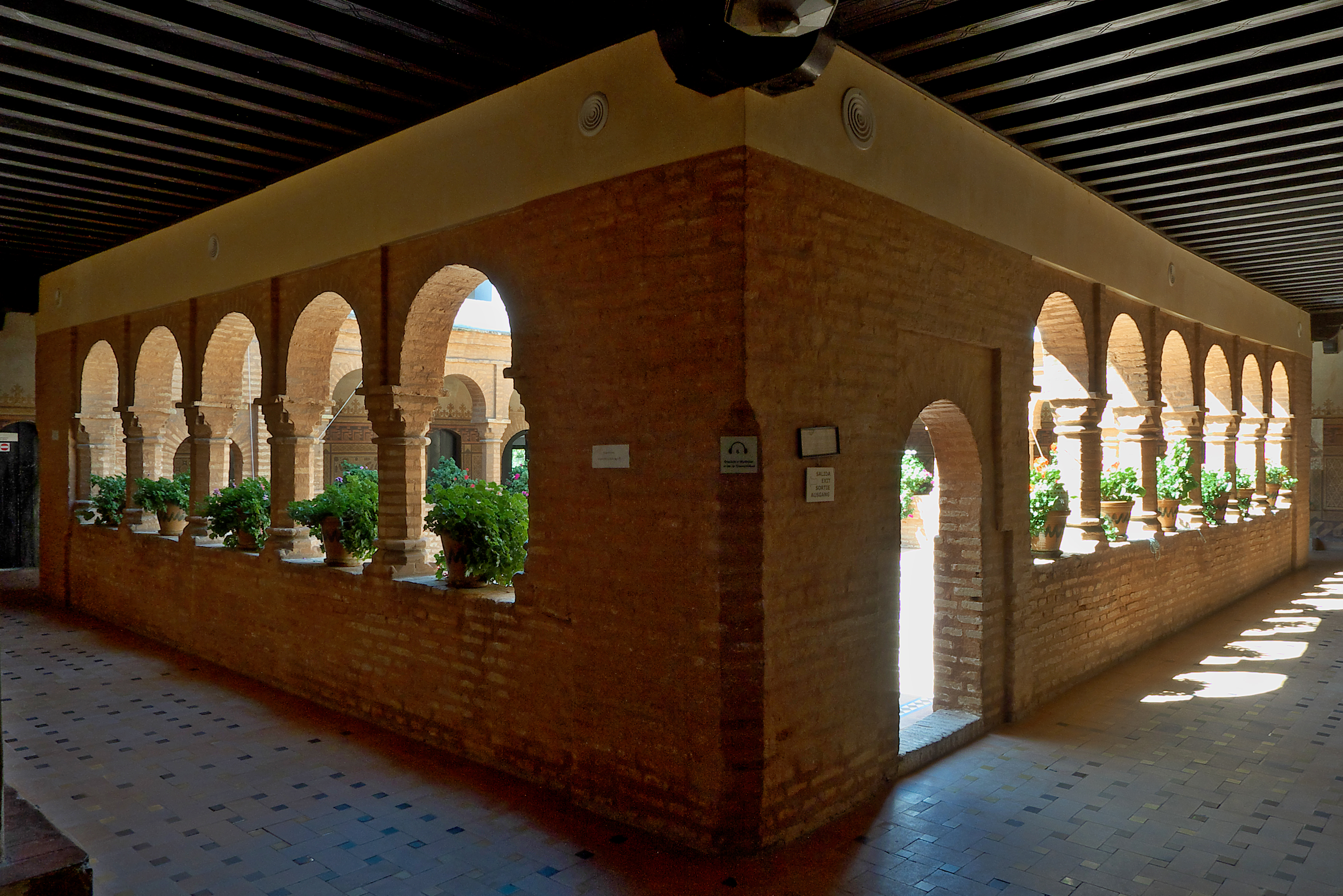 Valioso claustro de la arquitectura mudéjar del sur de España, integrado y conservado por la comunidad franciscana, a la que siempre ha estado vinculado.